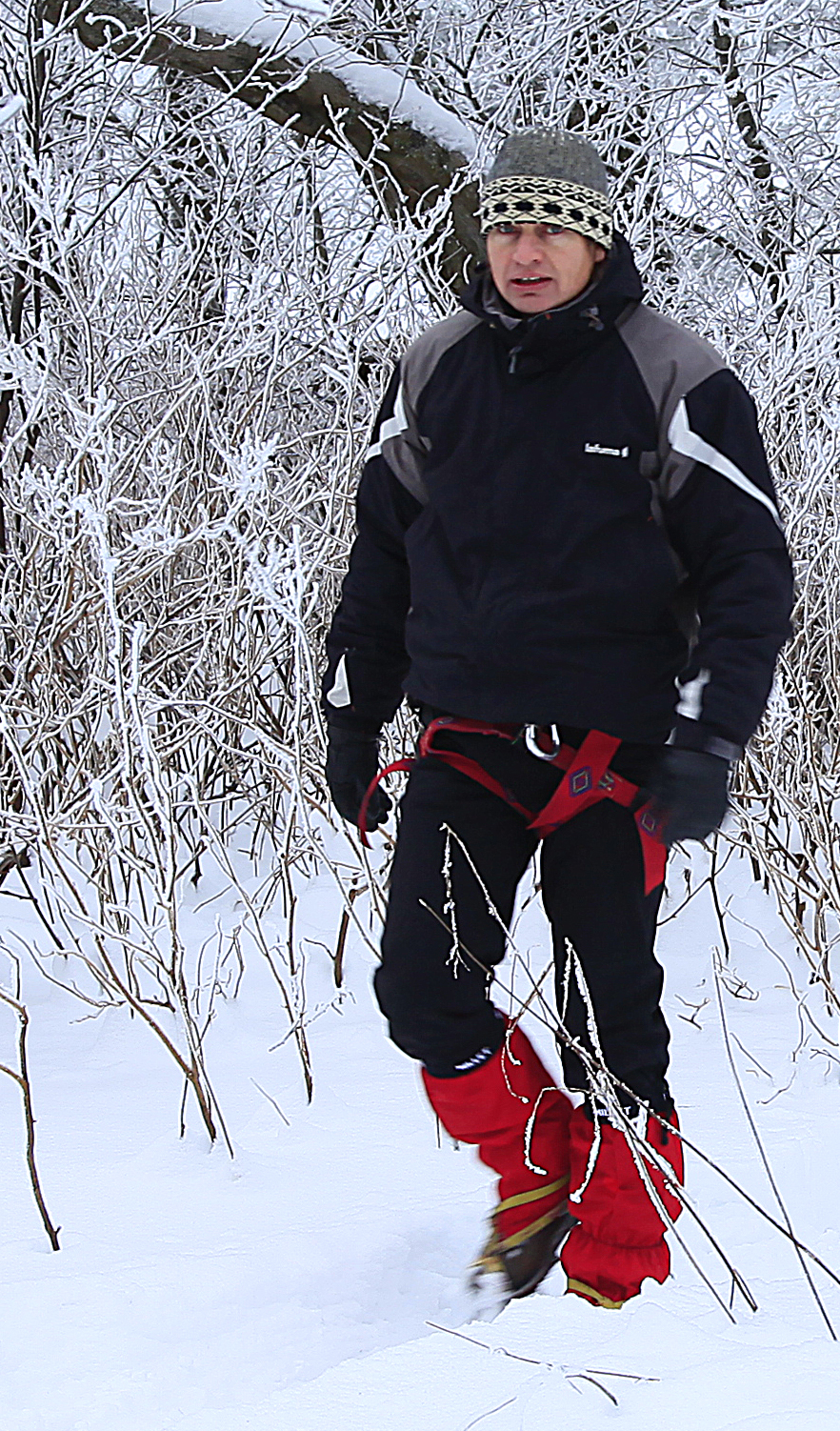 Igor Lematško